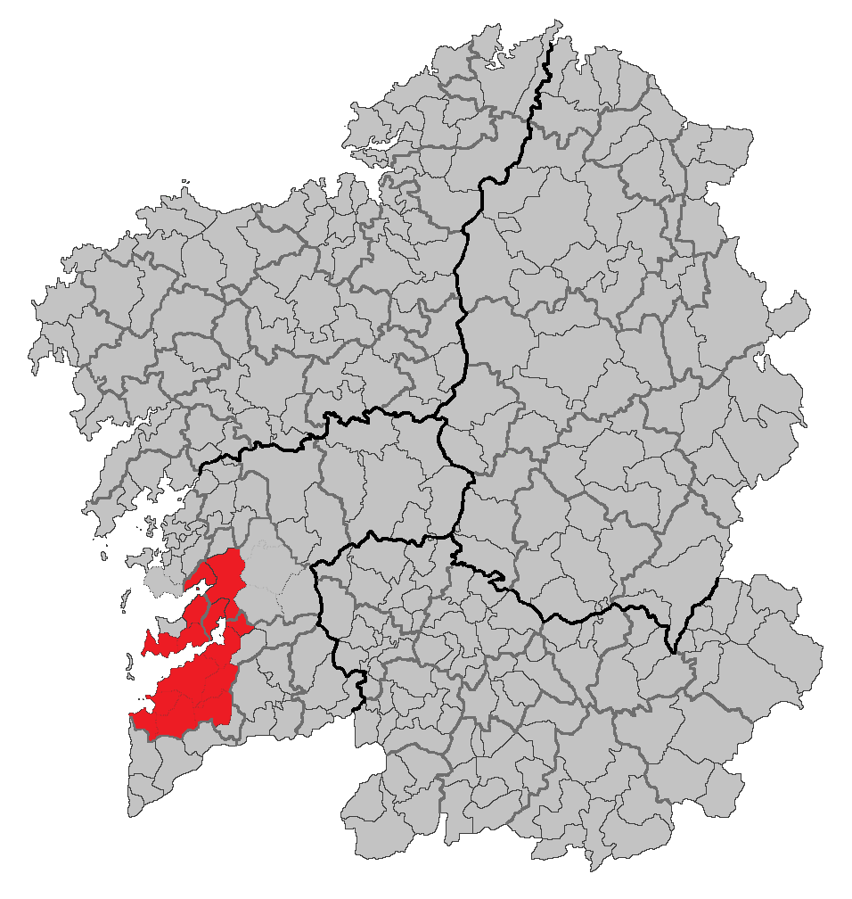 Área metropolitana de Vigo-Pontevedra